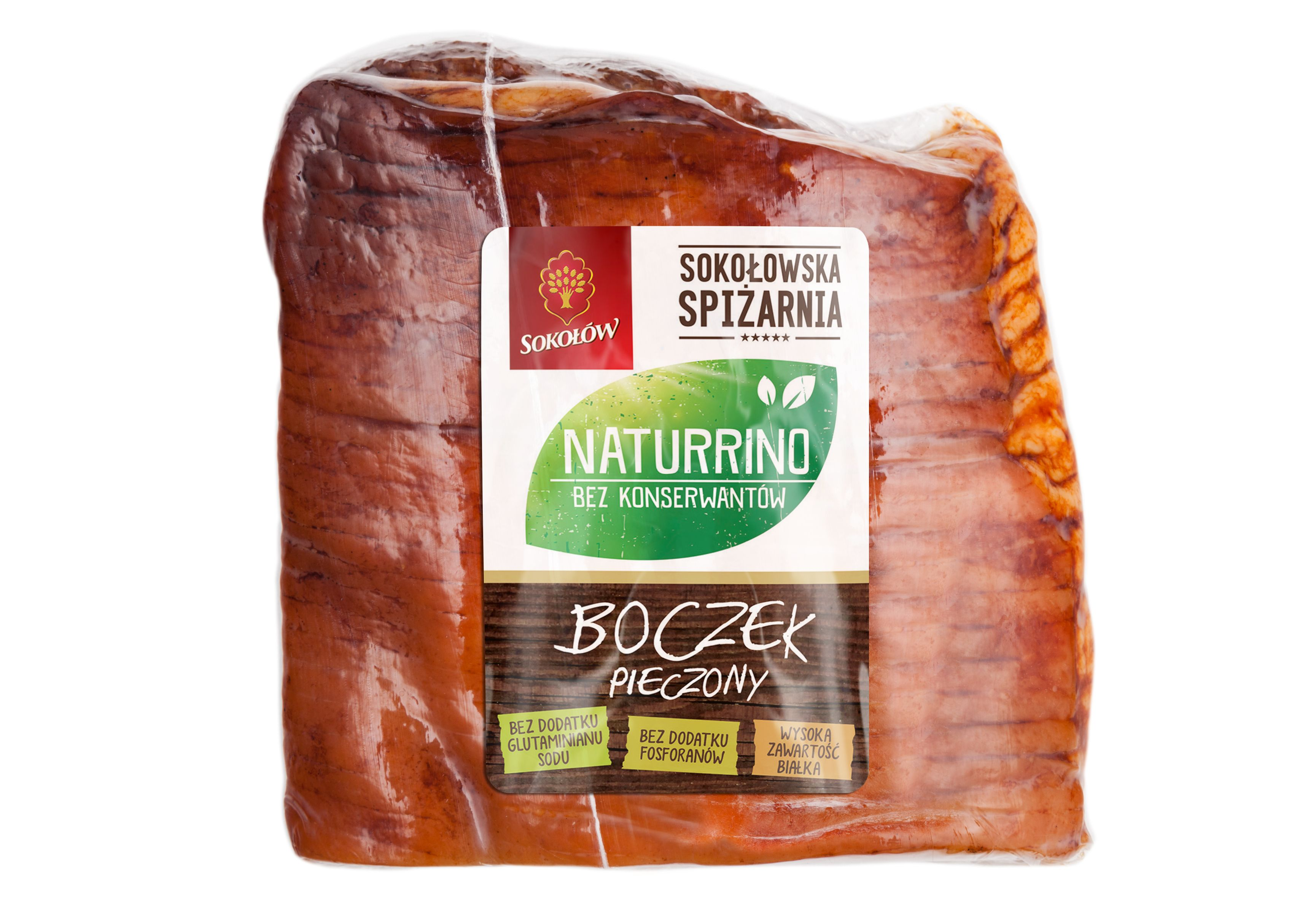 Sokołów S.A. Boczek Pieczony Naturrino